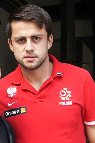 Łukasz Fabiański.